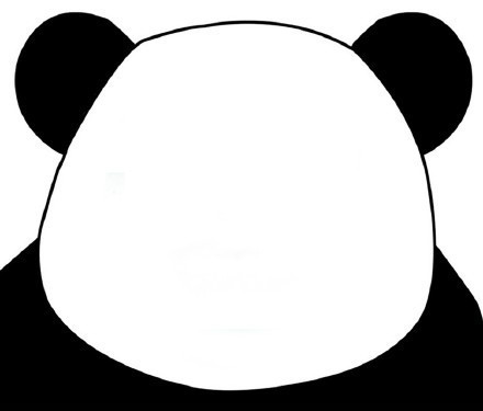 中文（中国大陆）: 熊猫头像（制作表情包用）